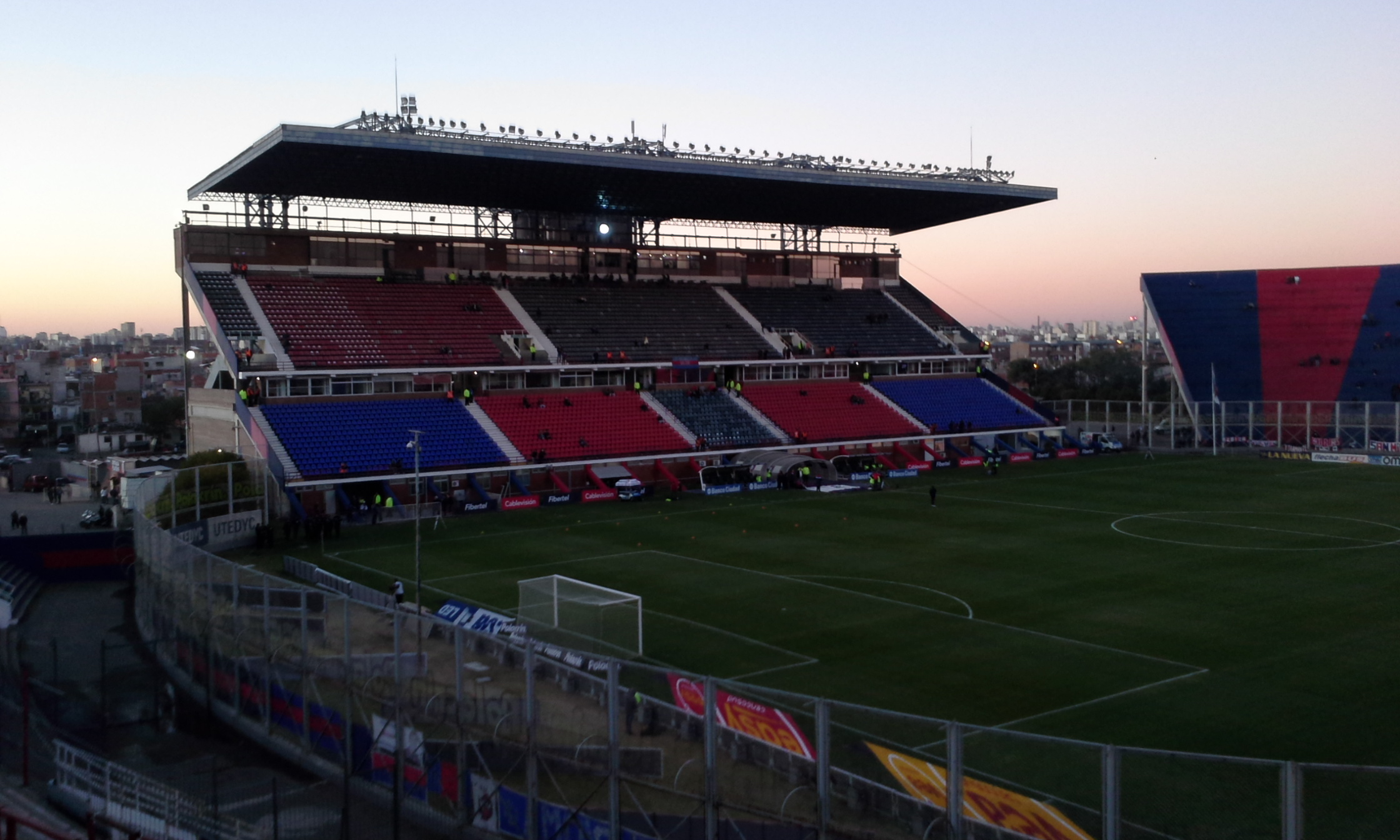 Platea Norte Nuevo Gasometro (San Lorenzo de Almagro)